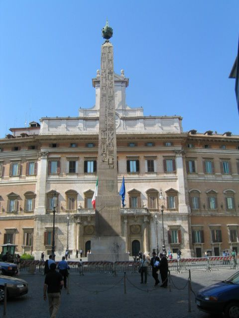 Piazza Monte Citorio, Roma, Italiaimg_1003